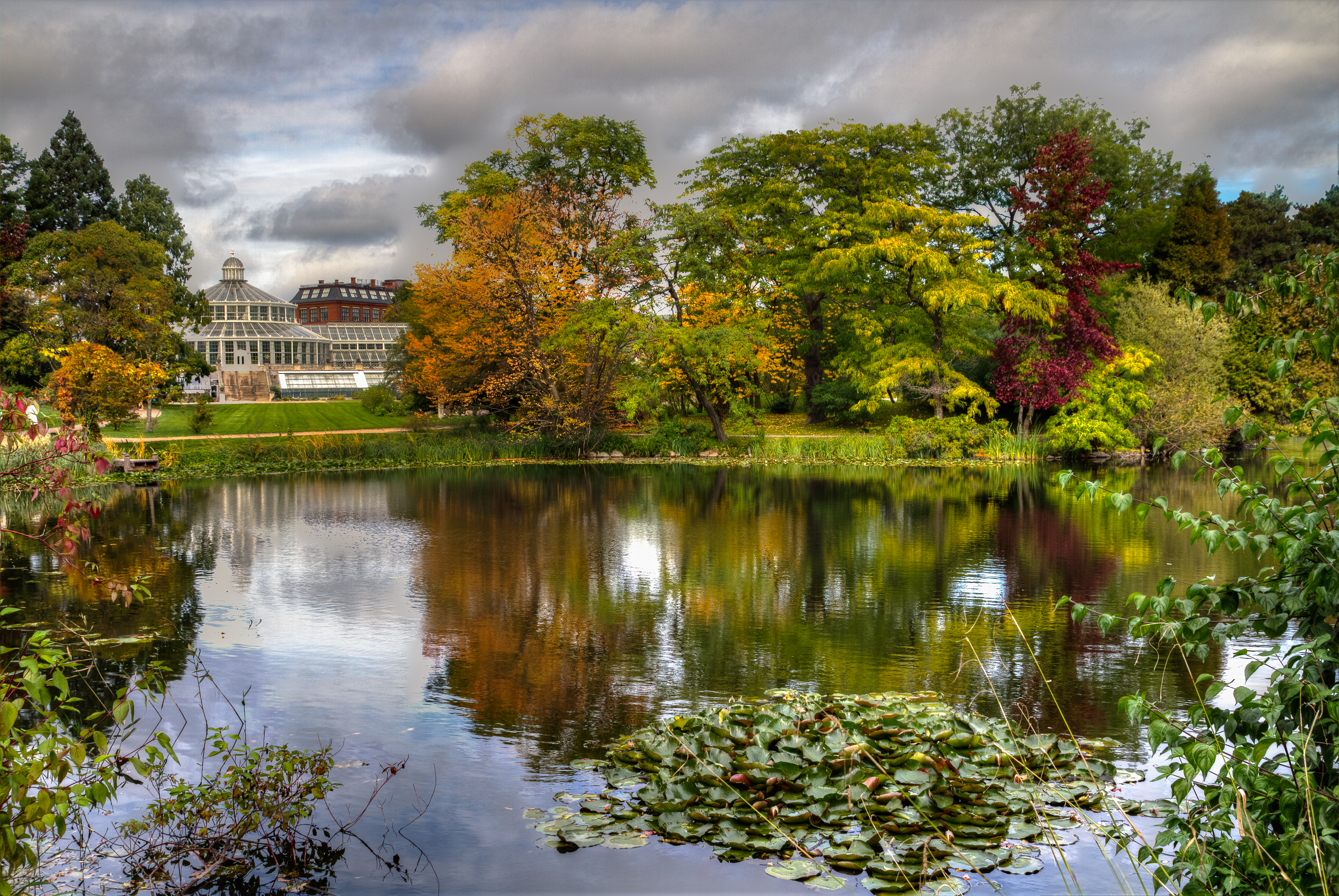 Botanisk Have